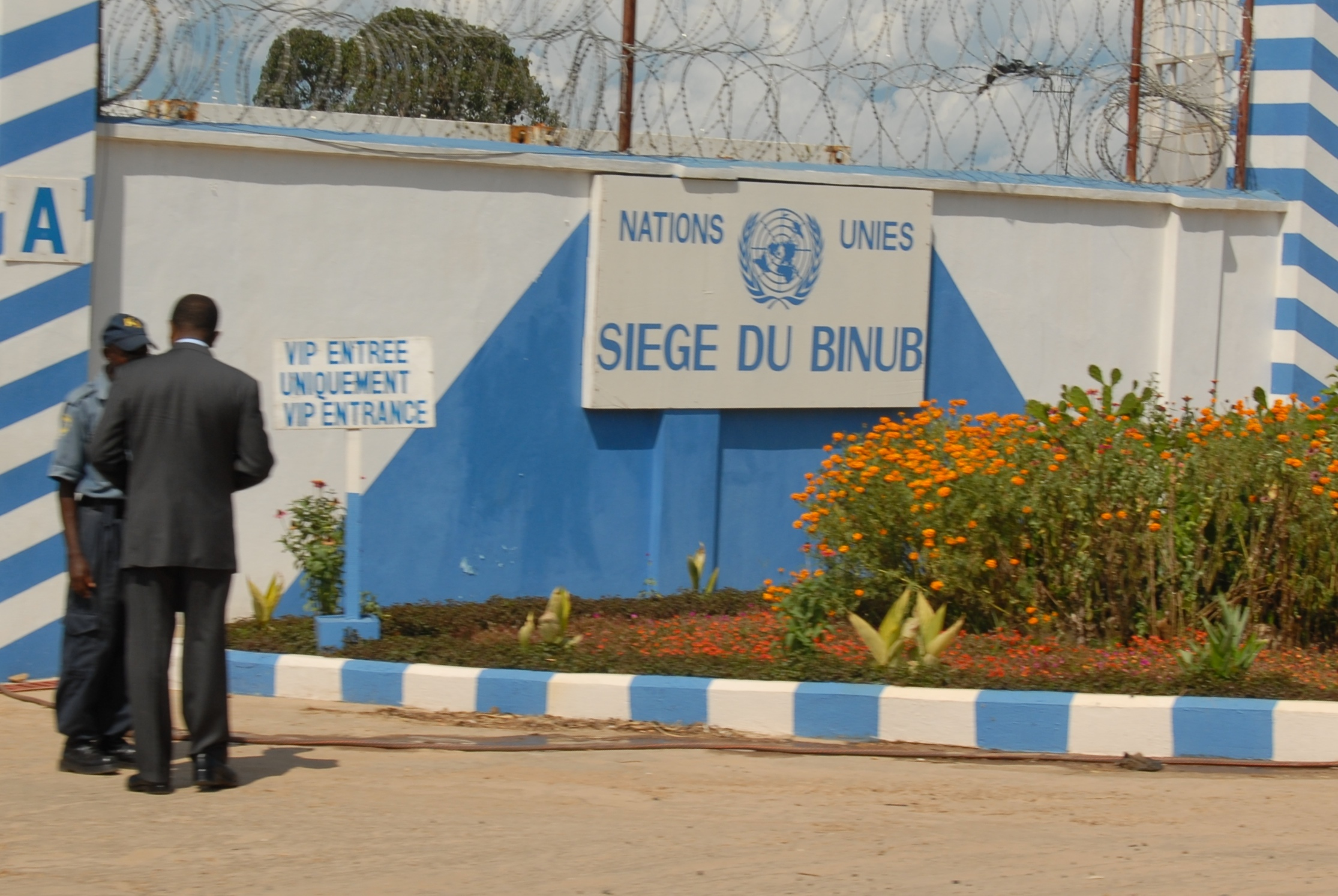 UN facilities in Bujumbura